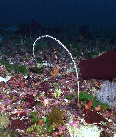 Ellisella sp en Pulley Ridge, EE.UU.